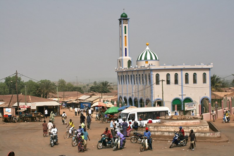 3320534.jpg